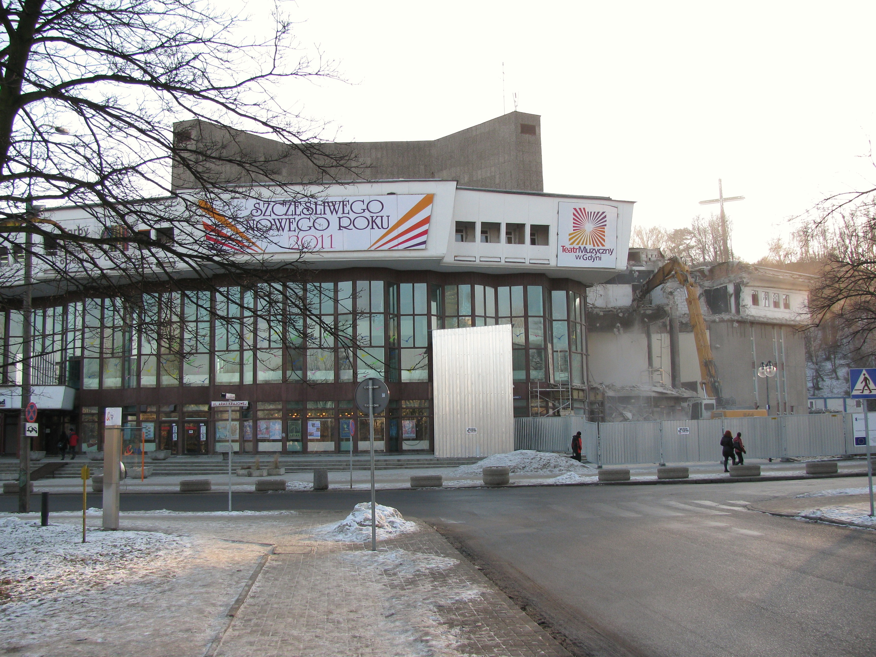 Gdynia. Teatr Muzyczny podczas przebudowy.